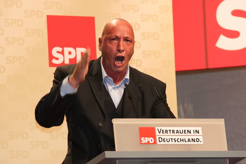 Uwe Hück, Betriebsratsvorsitzender der Porsche AG, Stuttgart (hier bei einer Wahlkampfveranstaltung der SPD Esslingen anlässlich eines Besuchs von Bundeskanzler Gerhard Schröder am 24. August 2005)